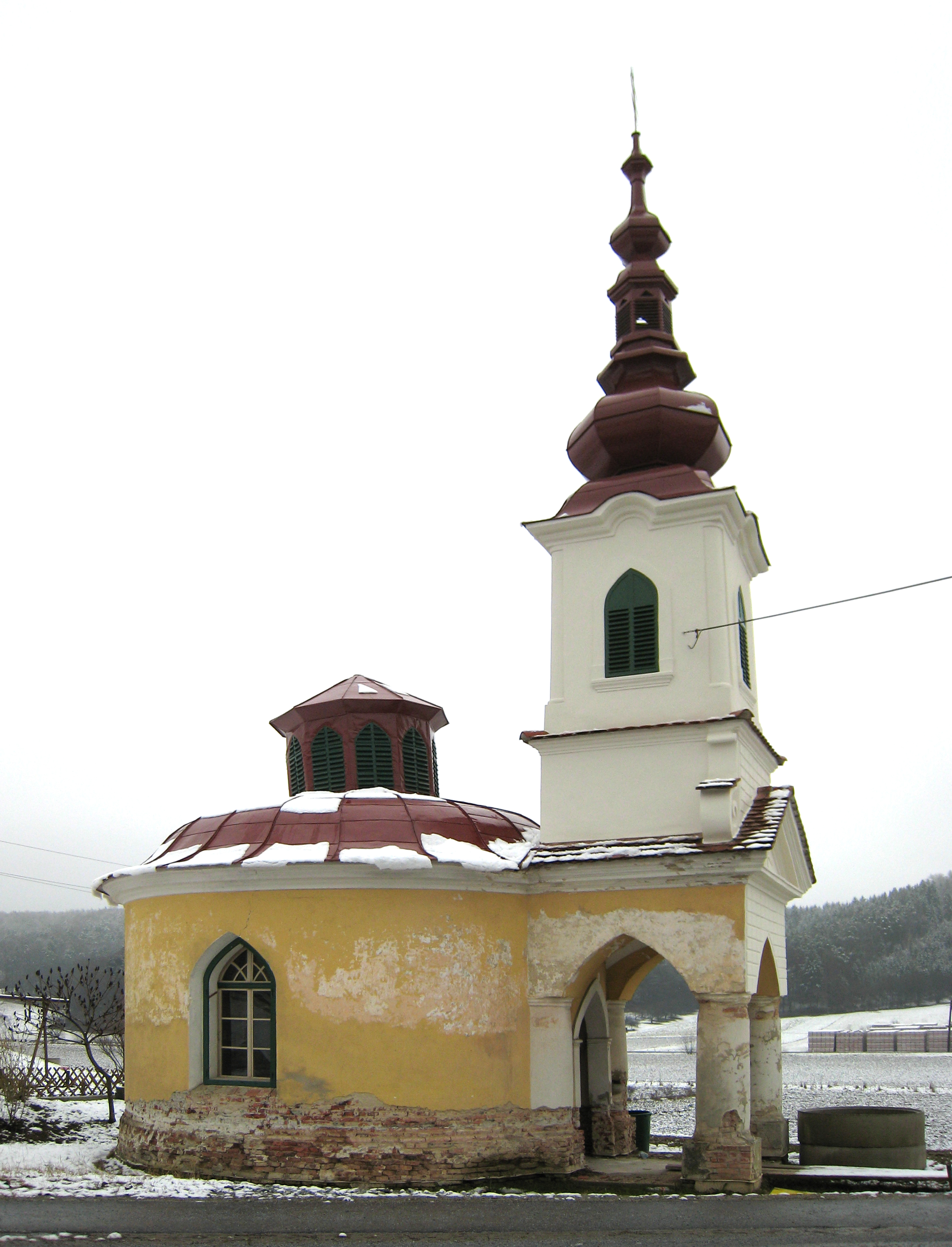 Ortskapelle Mariahilf in Dörfla